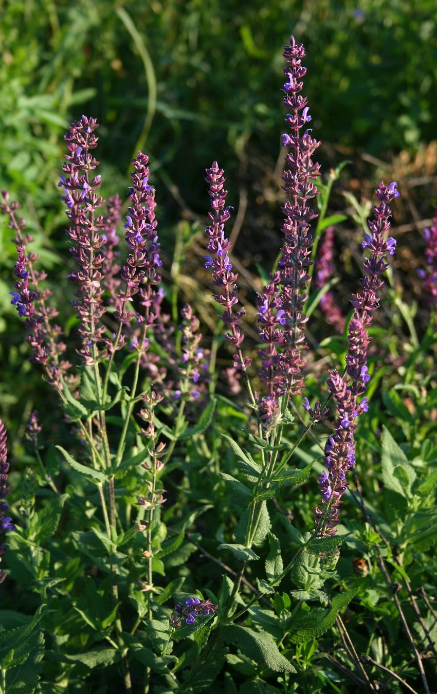 Steppen-Salbei (Salvia nemorosa), Lippenblütler (Lamiaceae) - Österreich/Austria/Autriche: Niederösterreich, Alpenostrand, ca. 1.5 km NNW Pfaffstätten